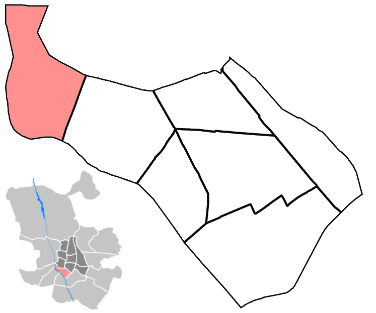 Mapa del barrio Imperial. Arganzuela. Madrid. España